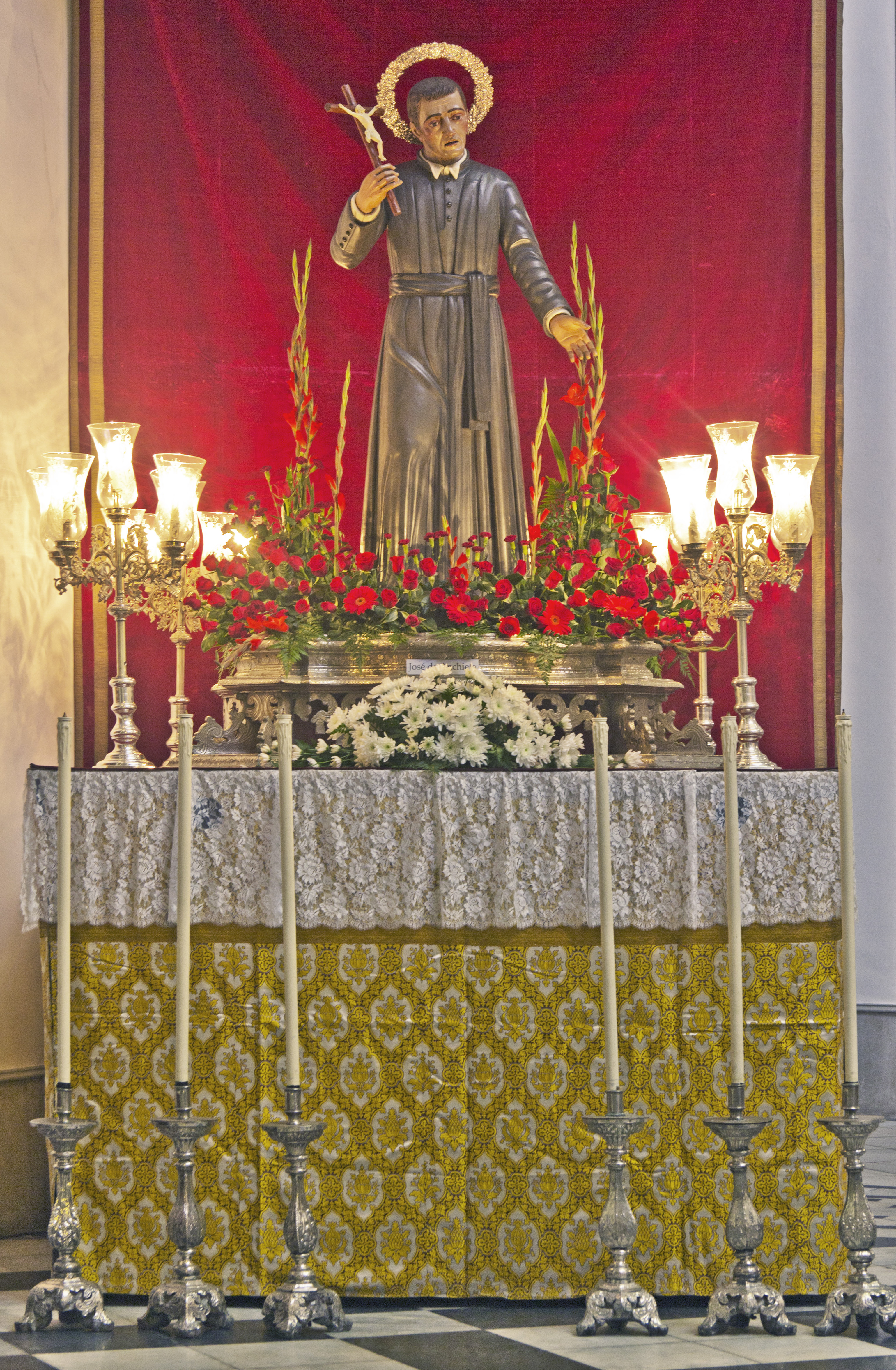 Escultura del San José de Anchieta en la Catedral de La Laguna 3 de abril de 2.014